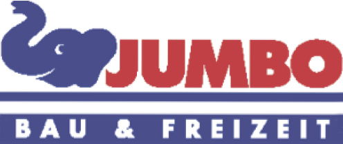 1997 – nach 15 Jahren – setzt JUMBO im Logo wieder auf das blaue Elefäntchen als Maskottchen.